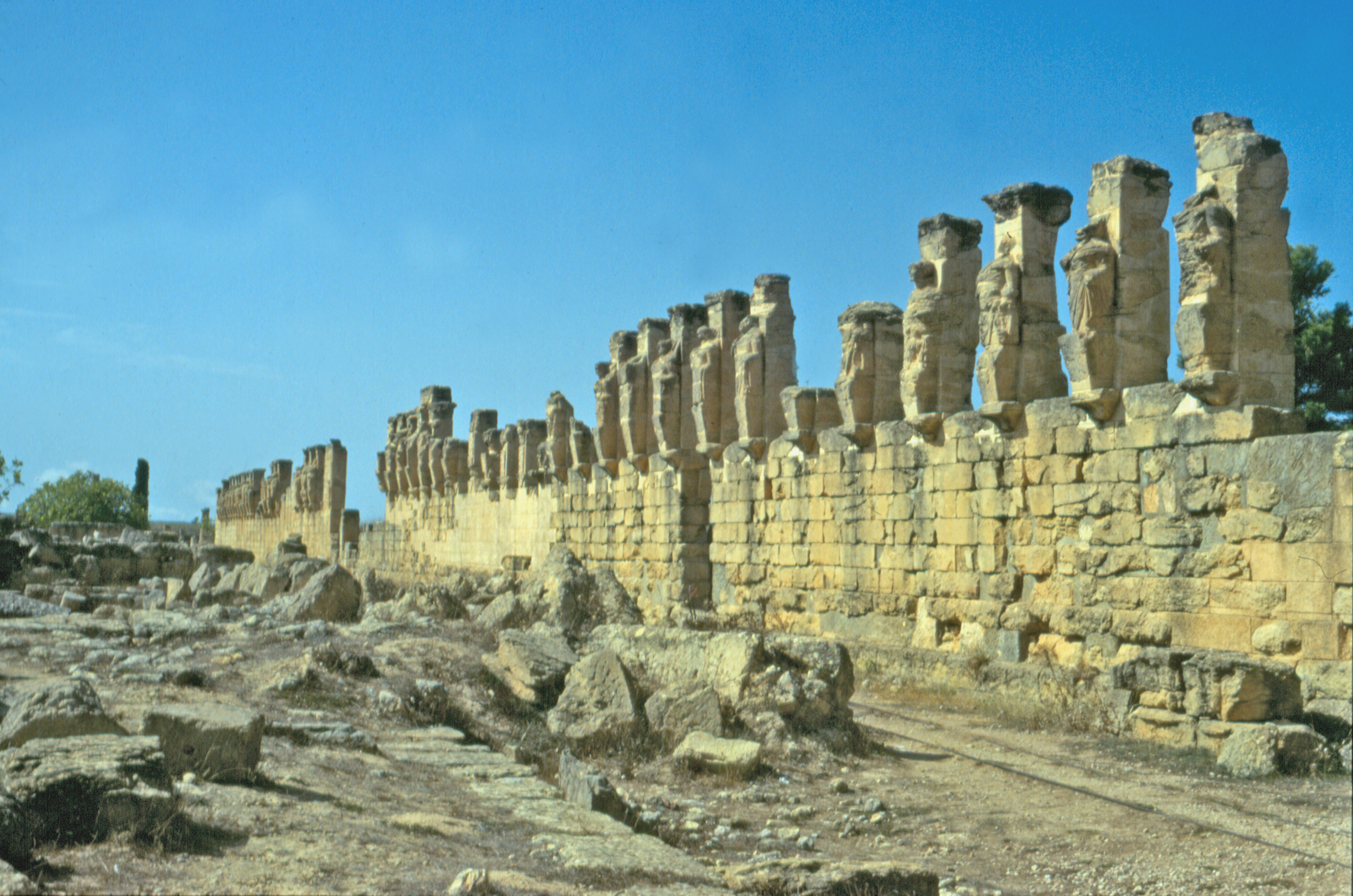 Libia, Cirene (sito archeologico), Portico delle Erme